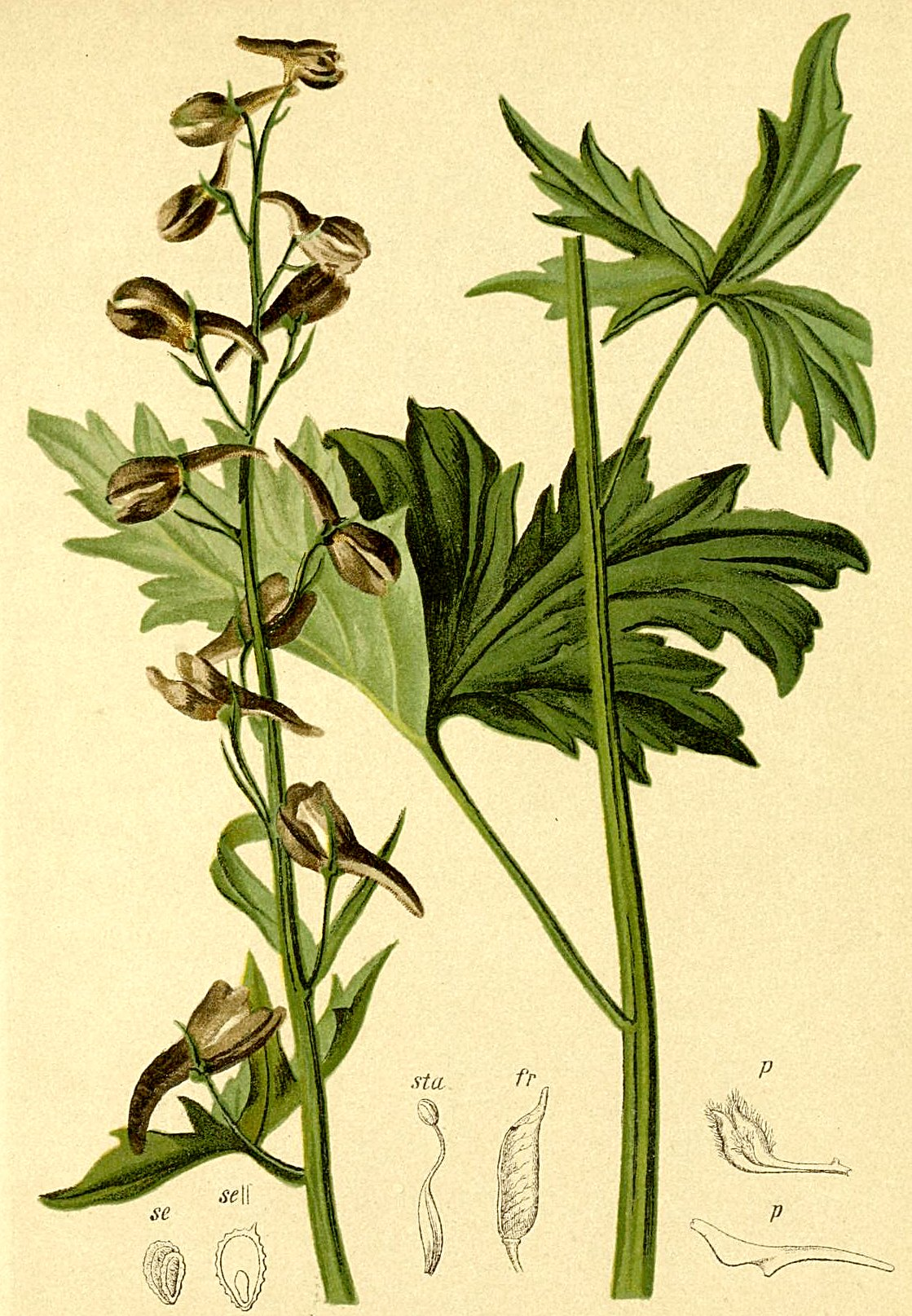 Delphinium elatum (Delphinium tiroliense)